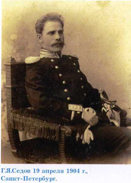 19.04.1904 г. Г.Я. Седов